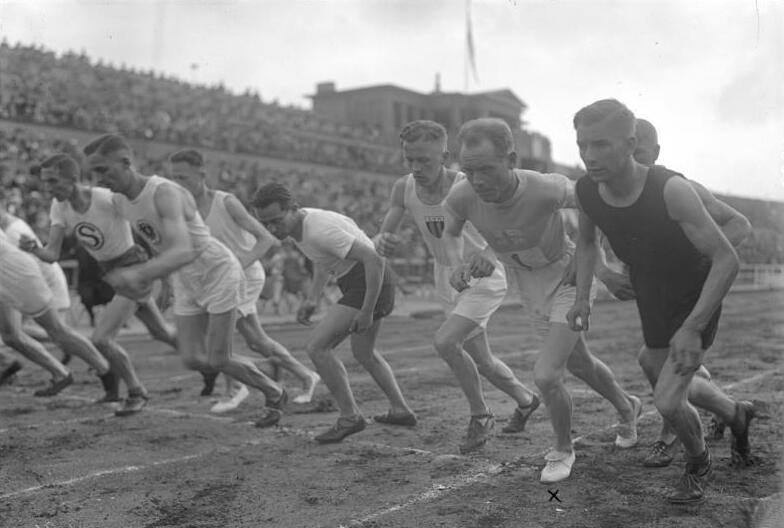 Nurmi "der fliegende Finne" und Weltmeister im 1500 und 3000 m Laufen startete erstmalig am 23.5. vor 50000 Zuschauern im Deutschen Stadion, Berlin. Nurmi (X) startet gegen gute Deutsche Klasse im 3000 m Lauf.